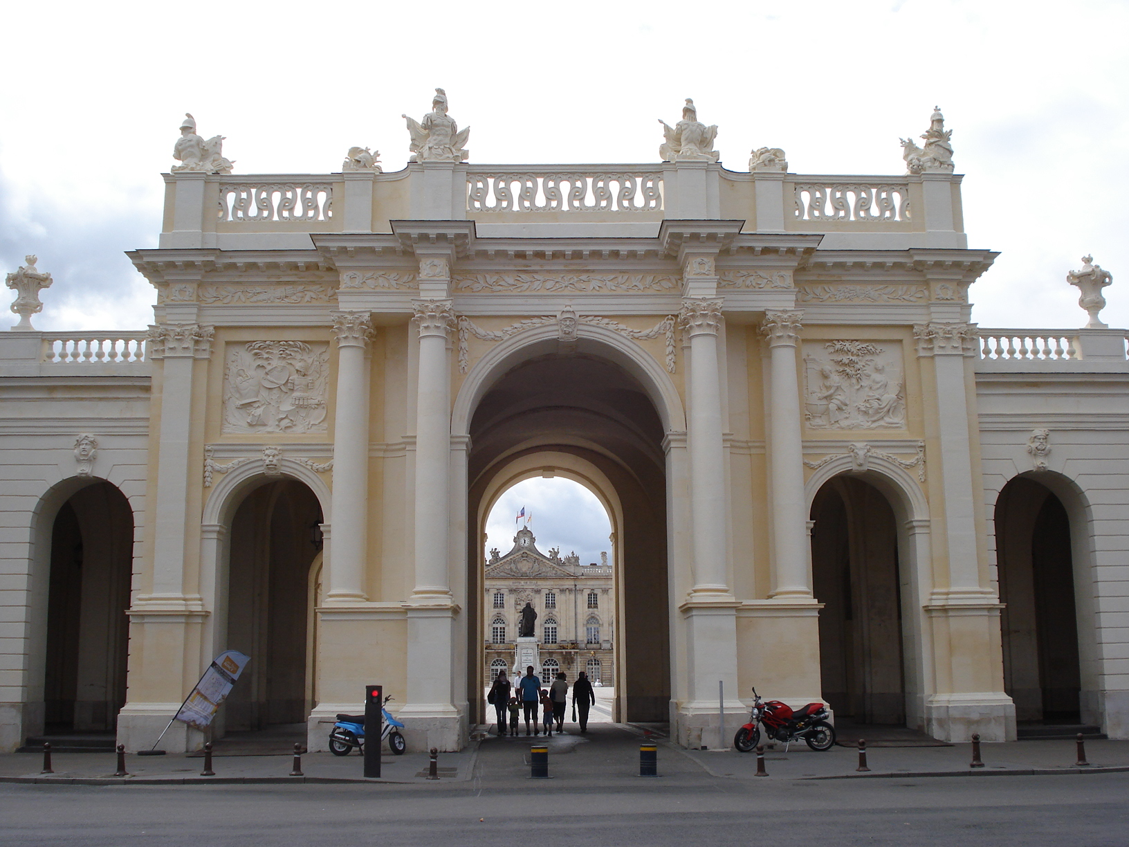 Arc Héré vue arrière Nancy (ensemble classé au patrimoine mondial de l'UNESCO)